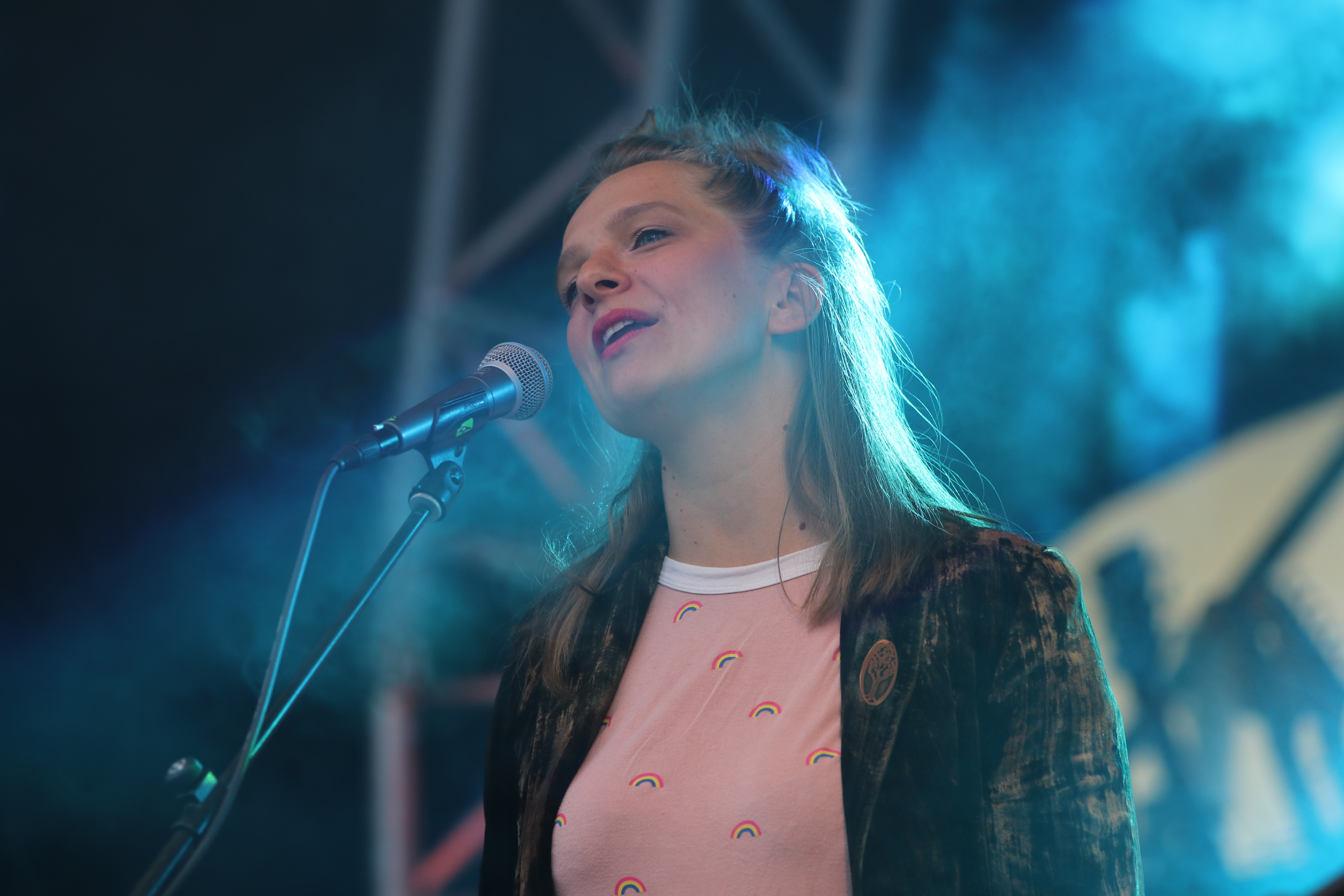 Fortuna Ehrenfeld, Liedermacherpop für Erwachsene aus Köln, am 2018-08-17 im Münchner Theatron. Keyboard: Jenny Thiele